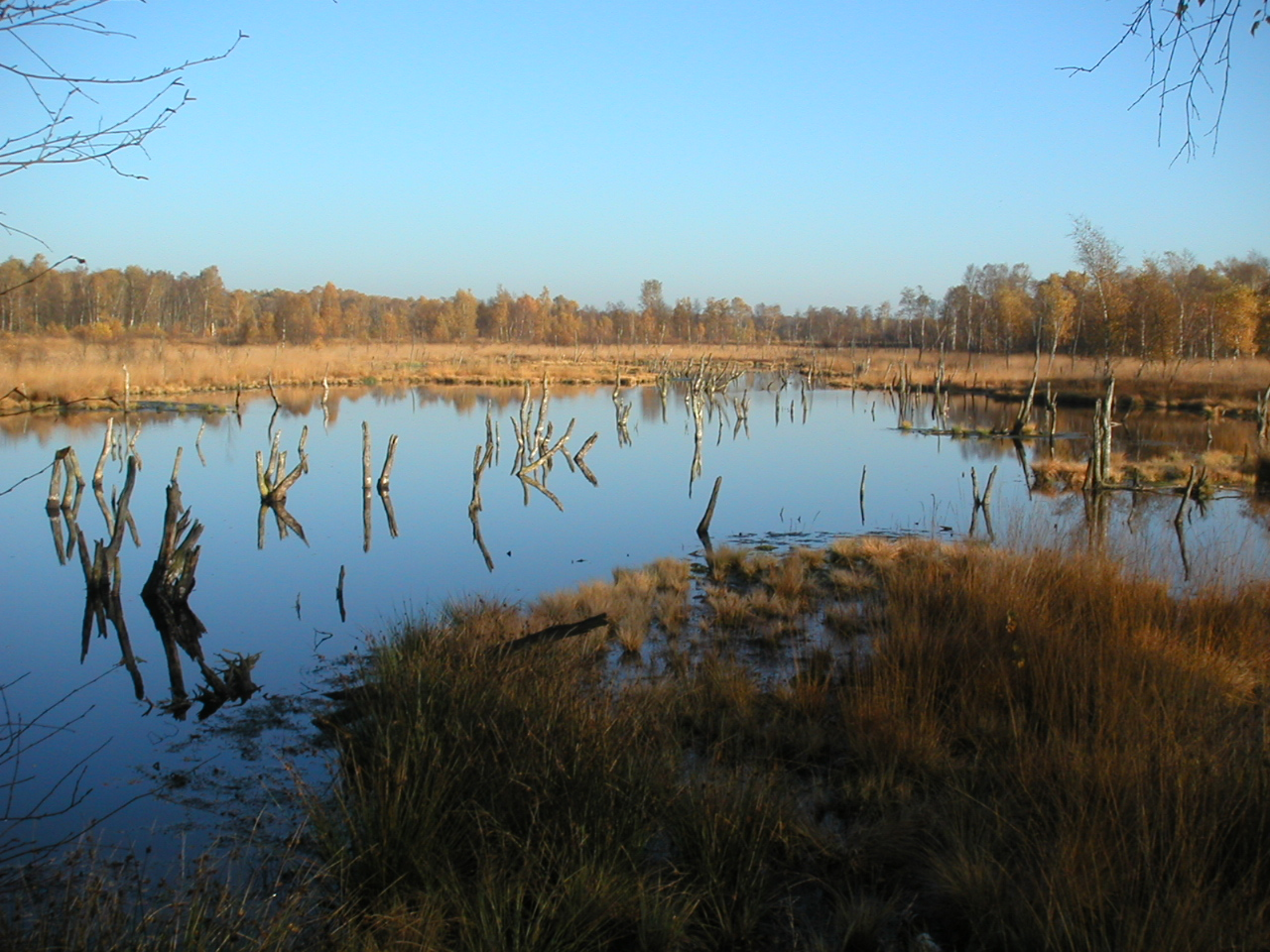 Das Wittmoor in Norderstedt-Glashütte im Herbst.